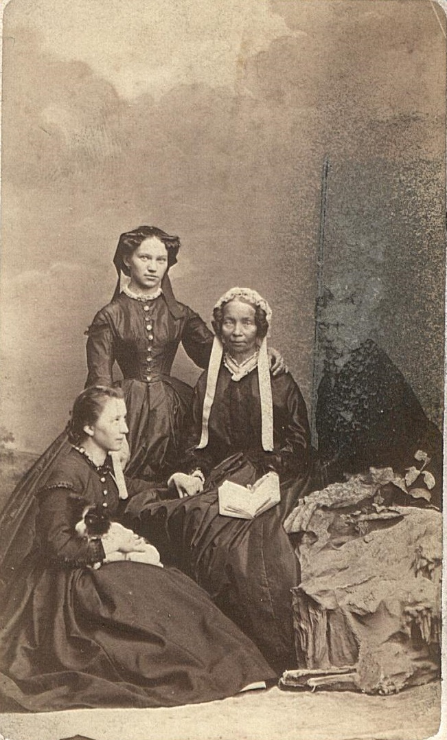 Konstancja z Cywińskich Hubicka (1813-1879) z córkami: Ireną Tustanowską (1850-1891) i Marią Grzybowską (1842-1916) oraz zięciem Franciszkiem Grzybowskim (1837-1916), fot. Walery Rzewuski, Kraków, 1866